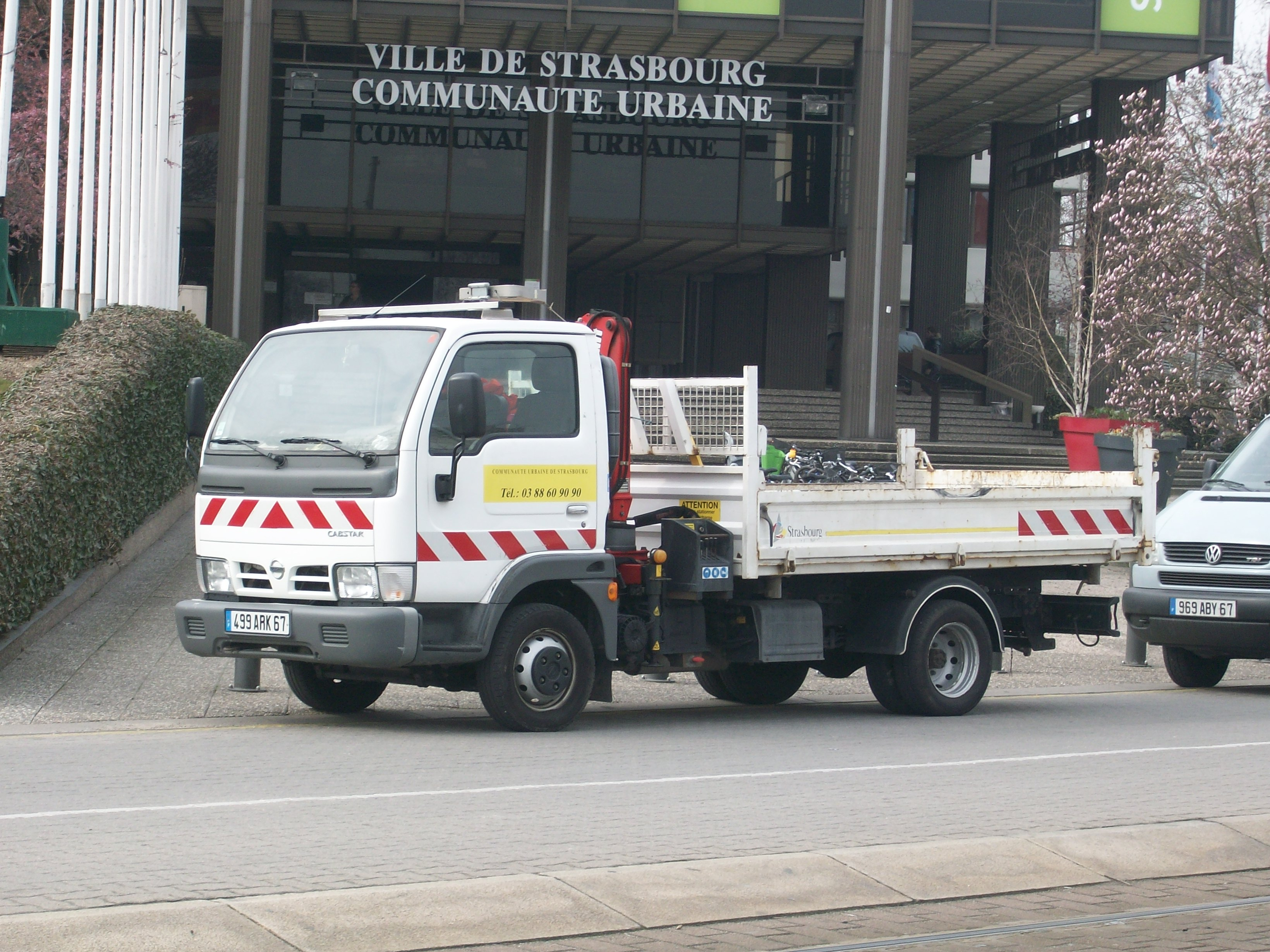 Nissan Atlas F23/Cabstar appartenant à la ville de Strasbourg